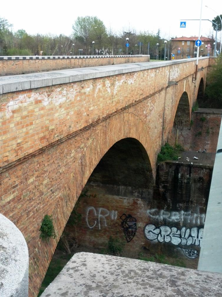 הגשר בפאנצה